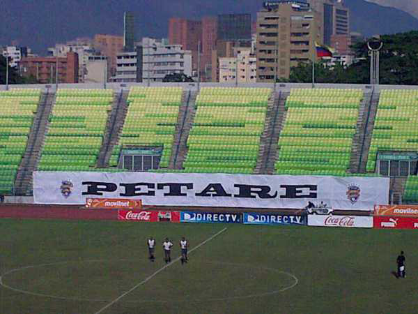 fotografia de la grada popular del olimpico en un juego del deportivo petare